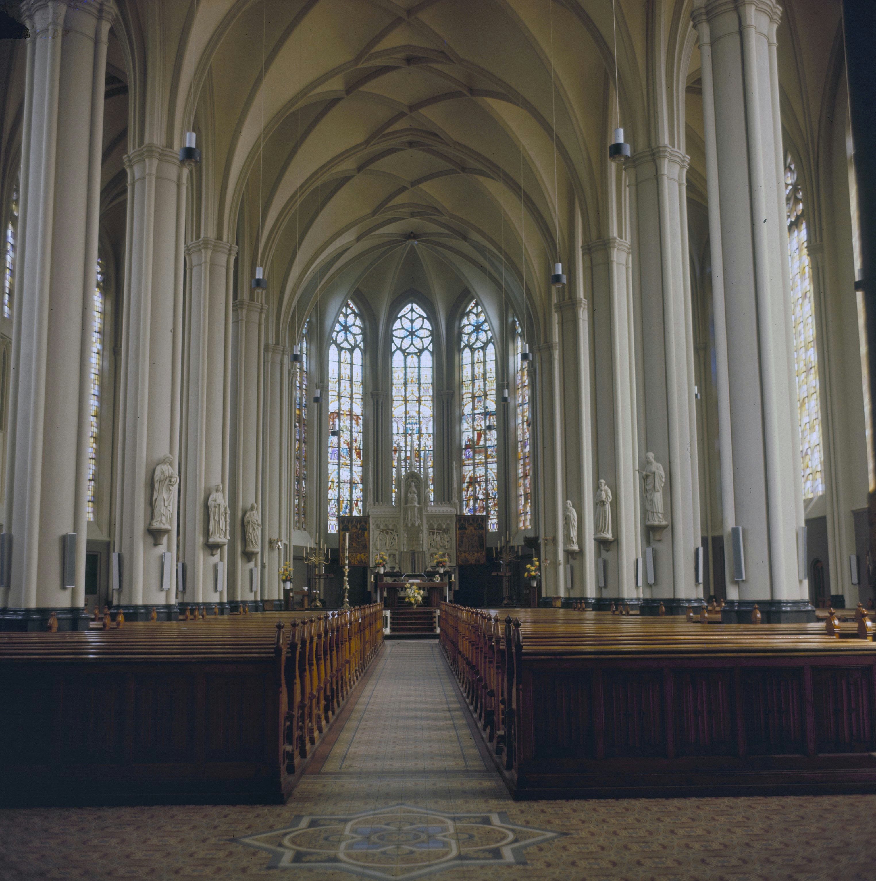 Rooms-katholieke kerk van de Heilige Kruisverheffing: Interieur, overzicht naar het oosten